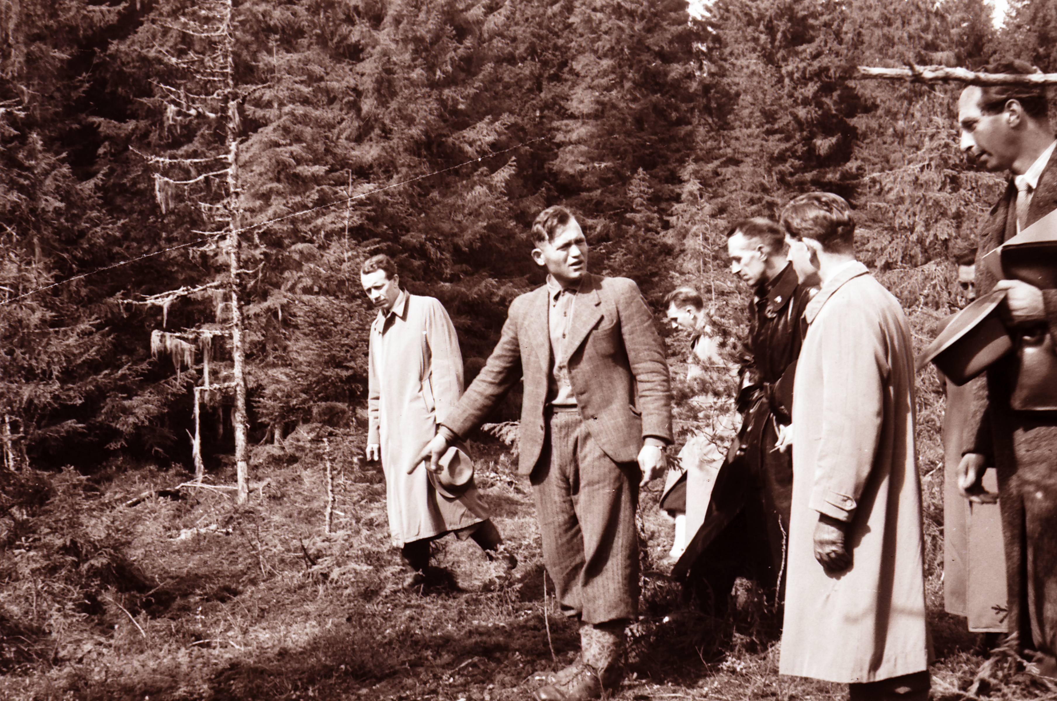 Ljuban Vukovic påviser grav i Falstadskogen, mai 1945. Ljuban Vukovic proves a grave in the Falstad Forest in May 1945. Fotograf / Photographer: Oskar A. Johansen Dato / Date: 1945 Sted / Place: Falstadskogen, Ekne, Nord-Trøndelag, Norge/Norway.